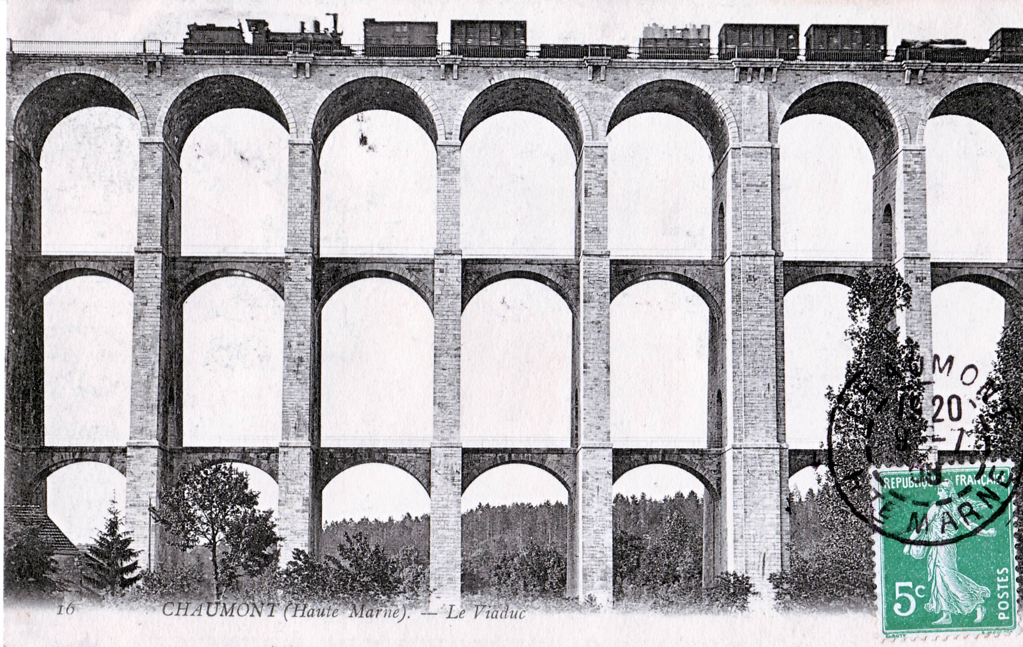 Carte postale ancienne, sans mention d'éditeur, n°16 : CHAUMONT - Le VIADUC